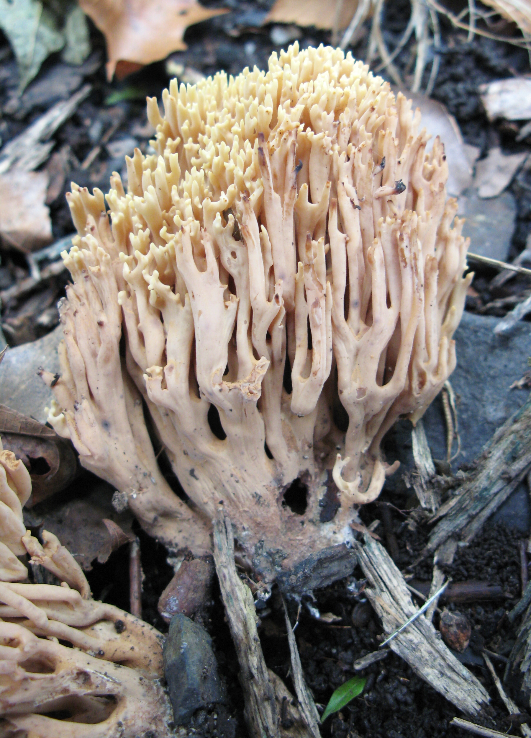 Ramaria formosa - Dreifarbige Koralle